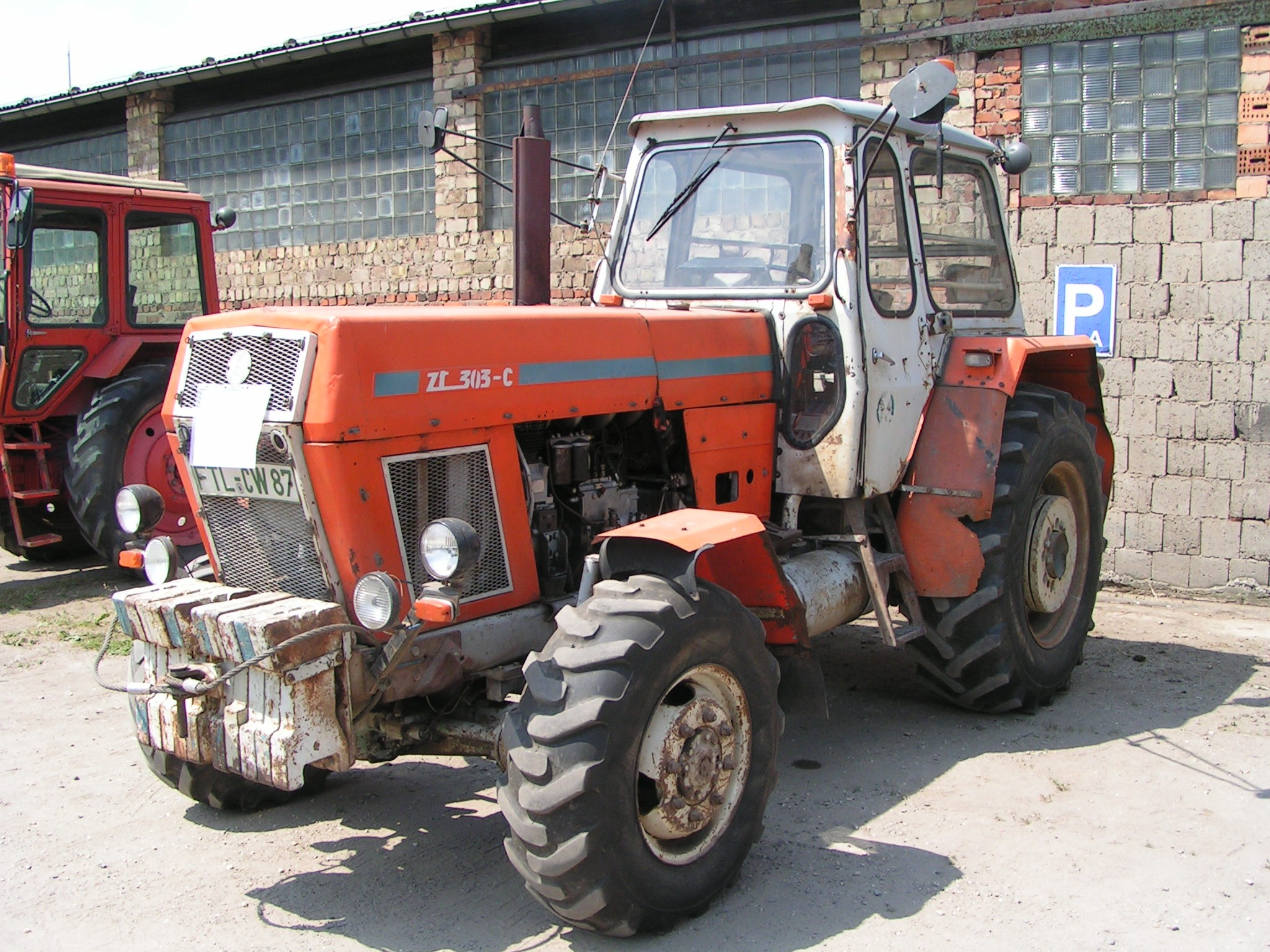 Fortschritt ZT 303-C in Dresden Roßthal, Schulfest 2010